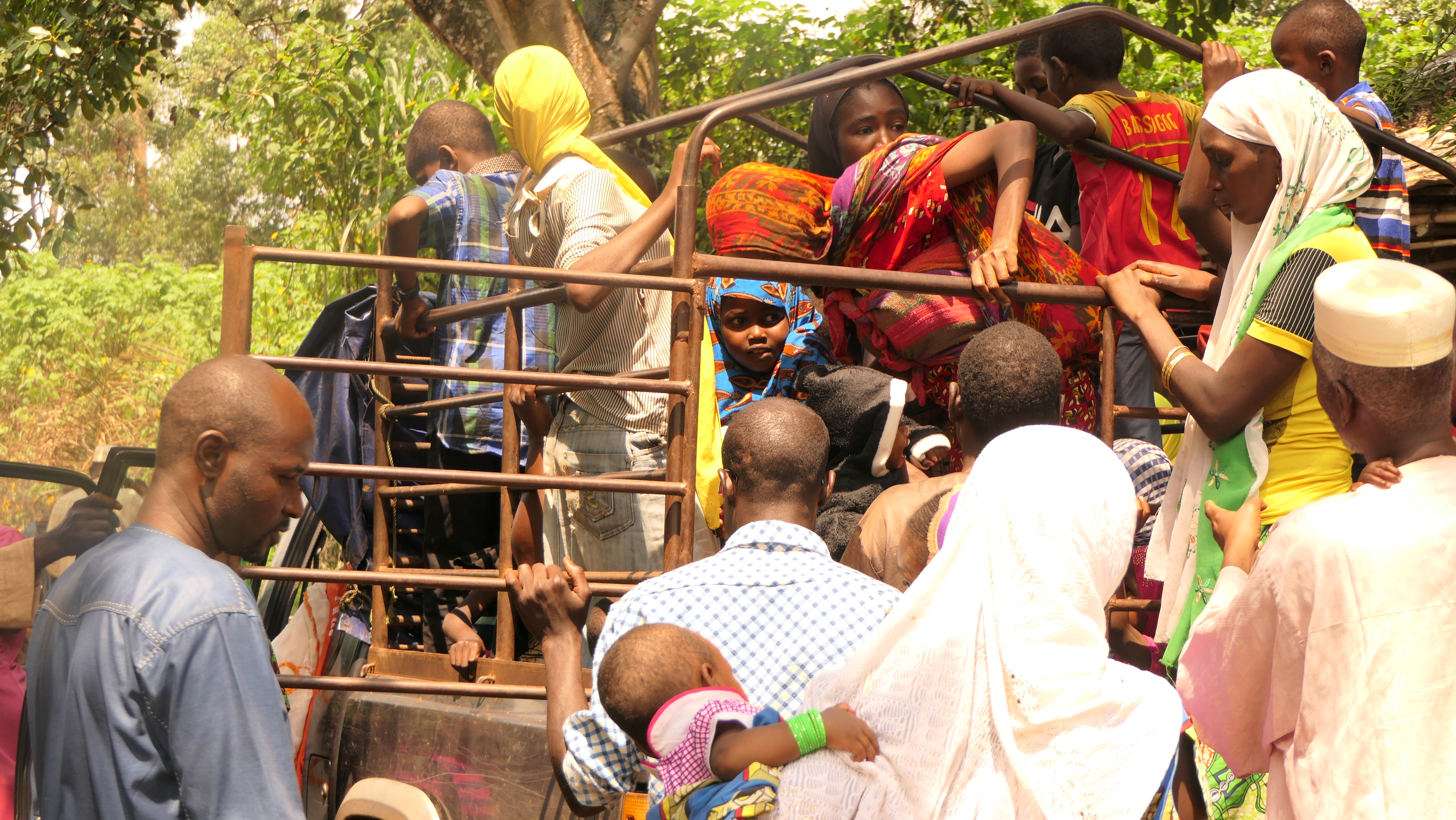 Moyen de transport des déplacés du nord-ouest installés aux rives du fleuve Noun dans le village bamedjin This is an image with the theme "Africa on the Move or Transport" from: Cameroon